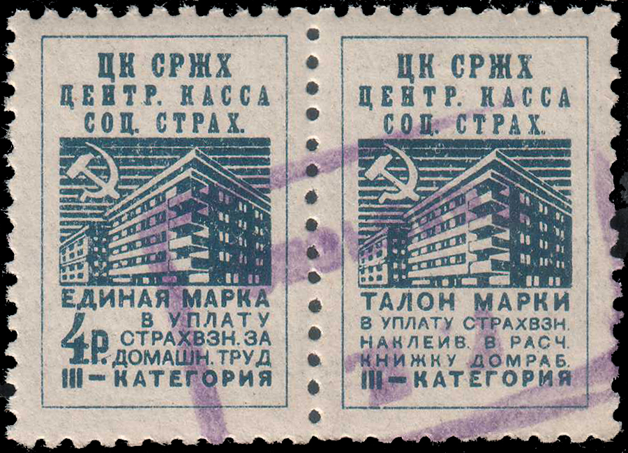 Страховая марка СССР, выпущенная ЦК СРЖХ